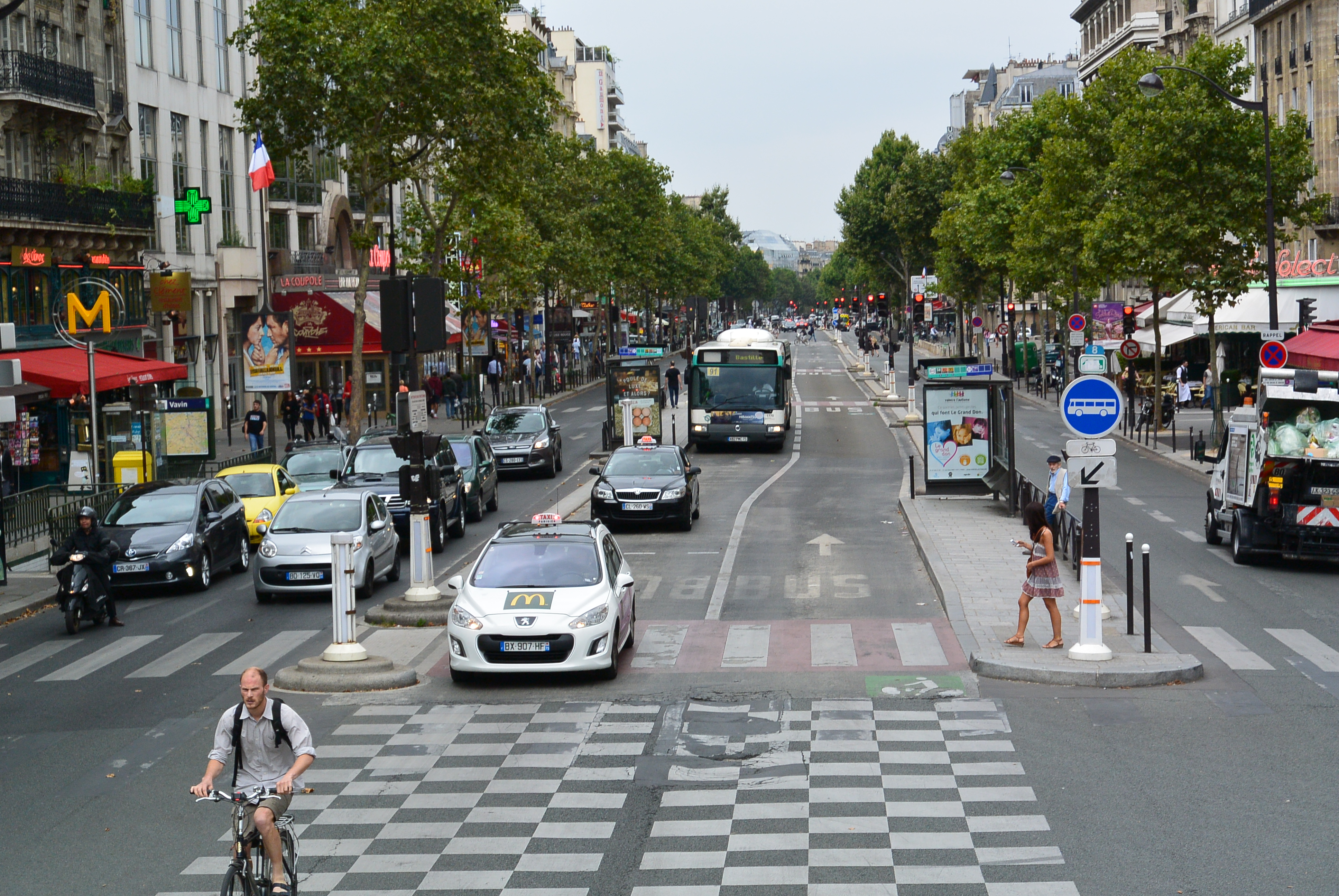 Boulevard du Montparnasse, Paris.